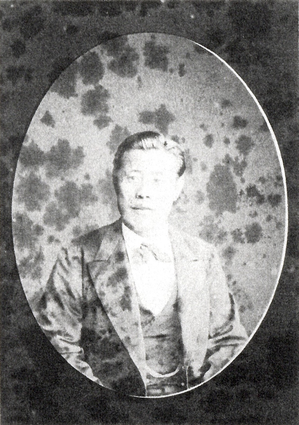 土岐頼知の肖像写真。